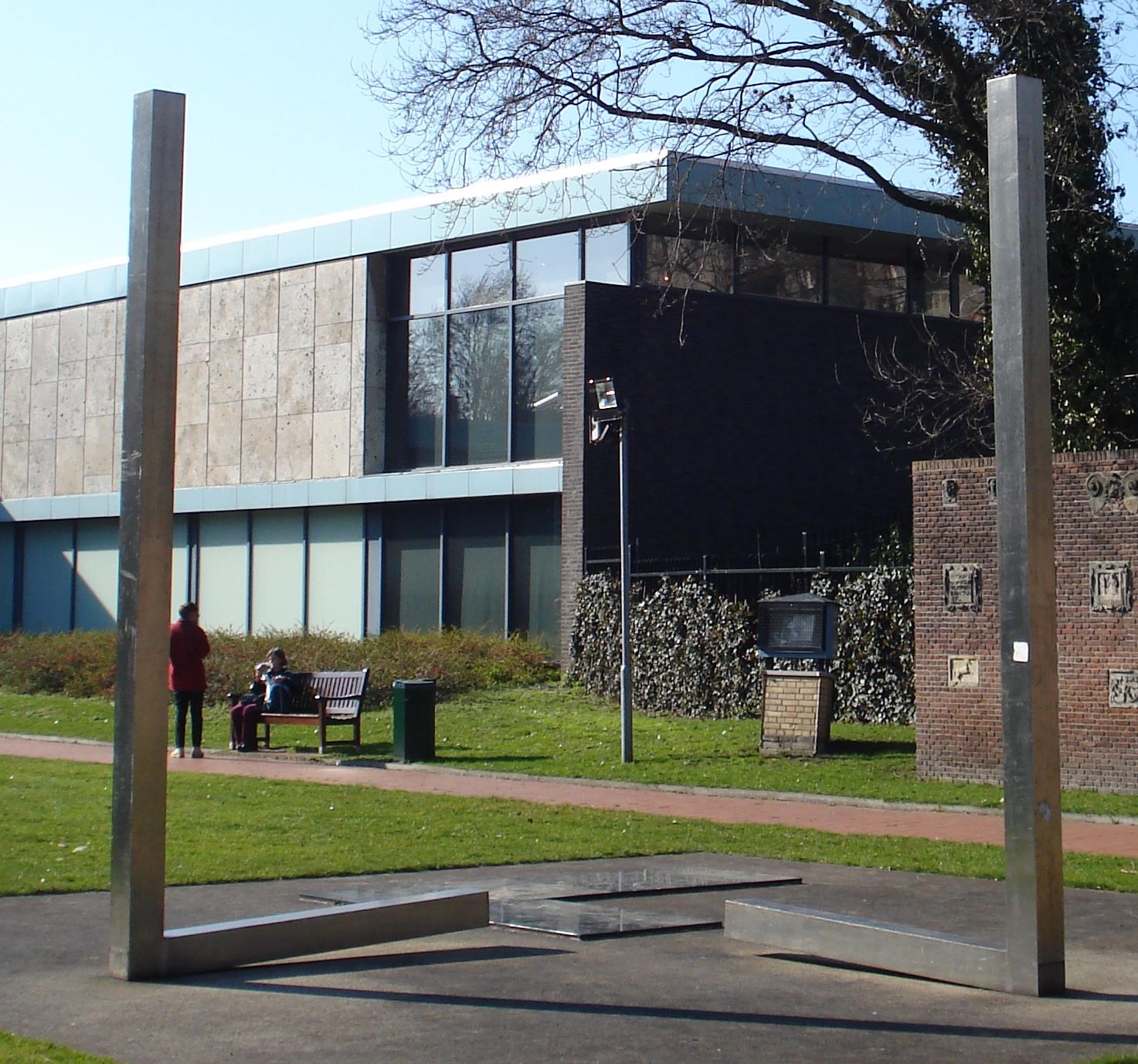 Den Haag, Stadhouderslaan, gemeentemuseum. Kunstwerk "Staand en liggend" van Jan Maaskant. The Hague/The Netherlands.